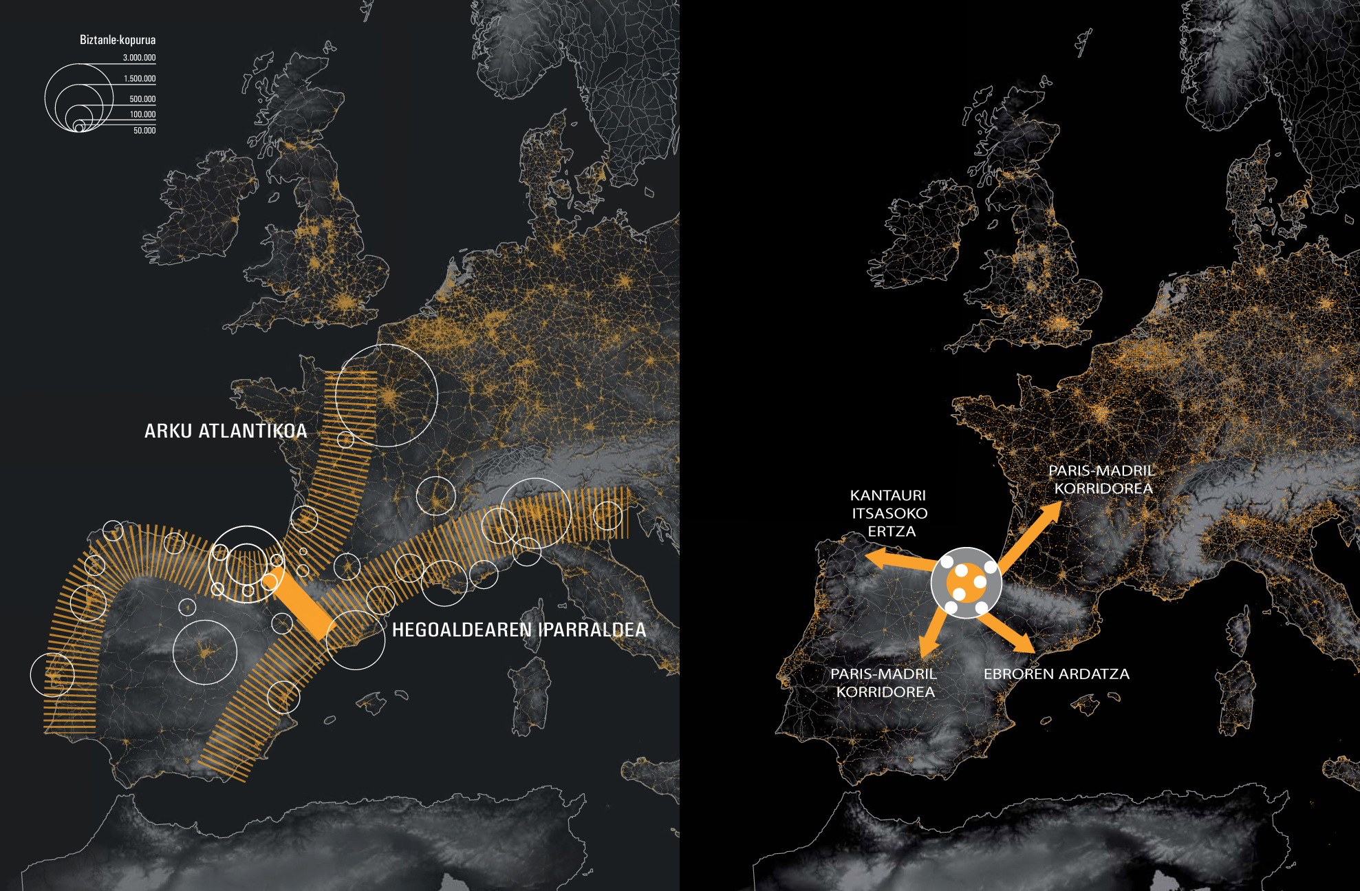 EAEko LAA berrien enfokea: Euskal Herria Europan.